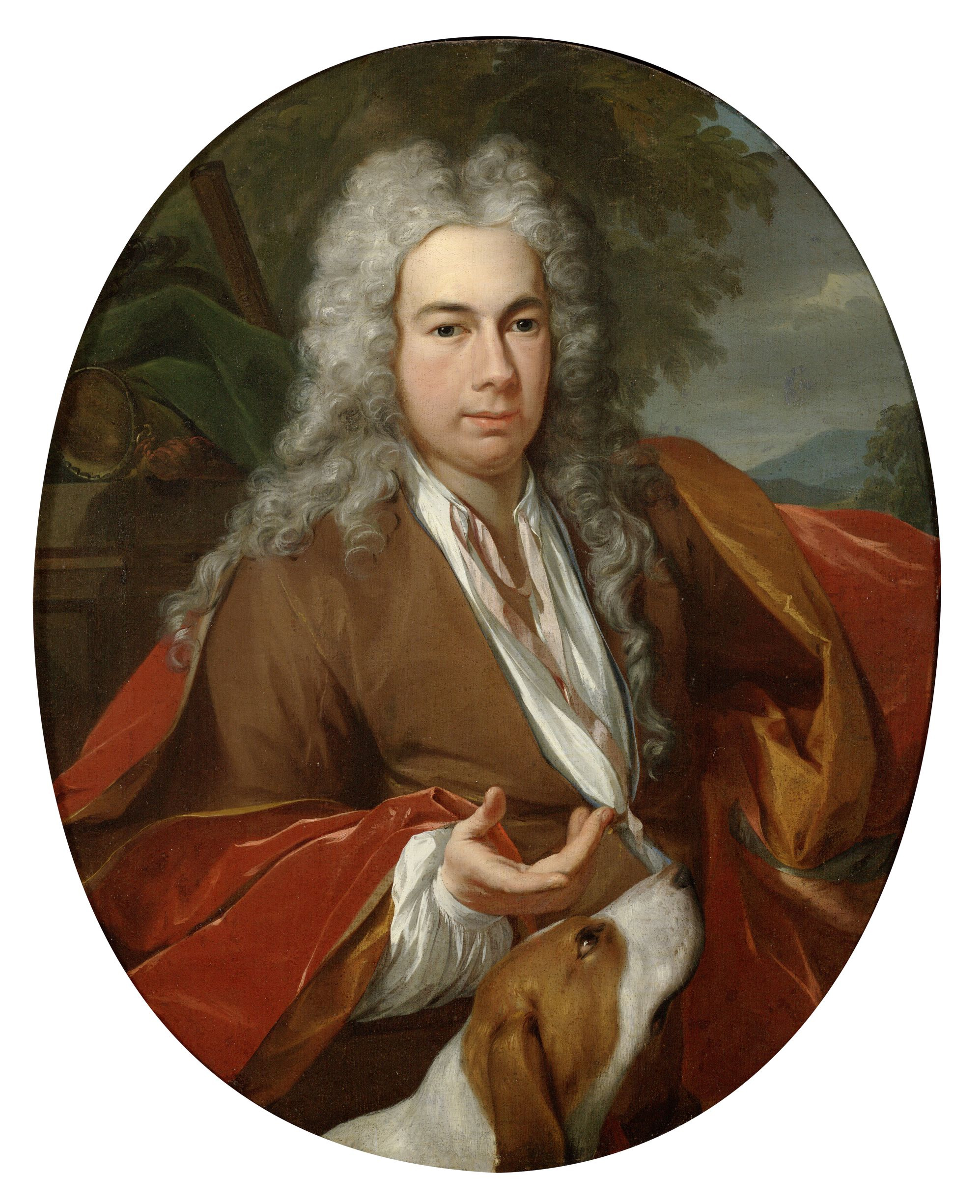 olieverf schilderij van Cornelis van Foreest door Nicolaes Verkolje. Getiteld: "Cornelis van Foreest"Omschrijving:Ovaal portret van jongeman ten halve lijve, gekleed in portretkostuum. Op het hoofd een lange weelderige pruik. Hij maakt een welsprekend gebaar naar toeschouwer. Bij hem een jachthond. Het geheel geplaatst in een heuvelachtig landschap. Links achter hem een zuil met daarop diverse voorwerpen.